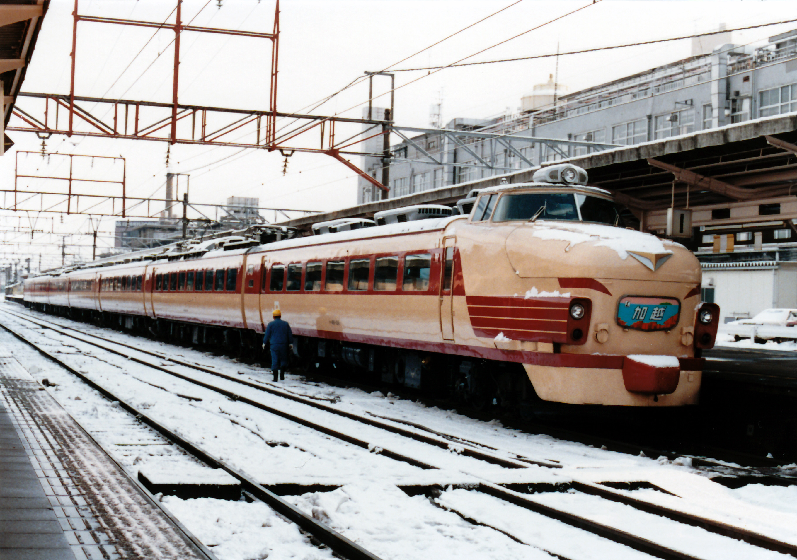 加越 ボンネット485系（金沢駅）